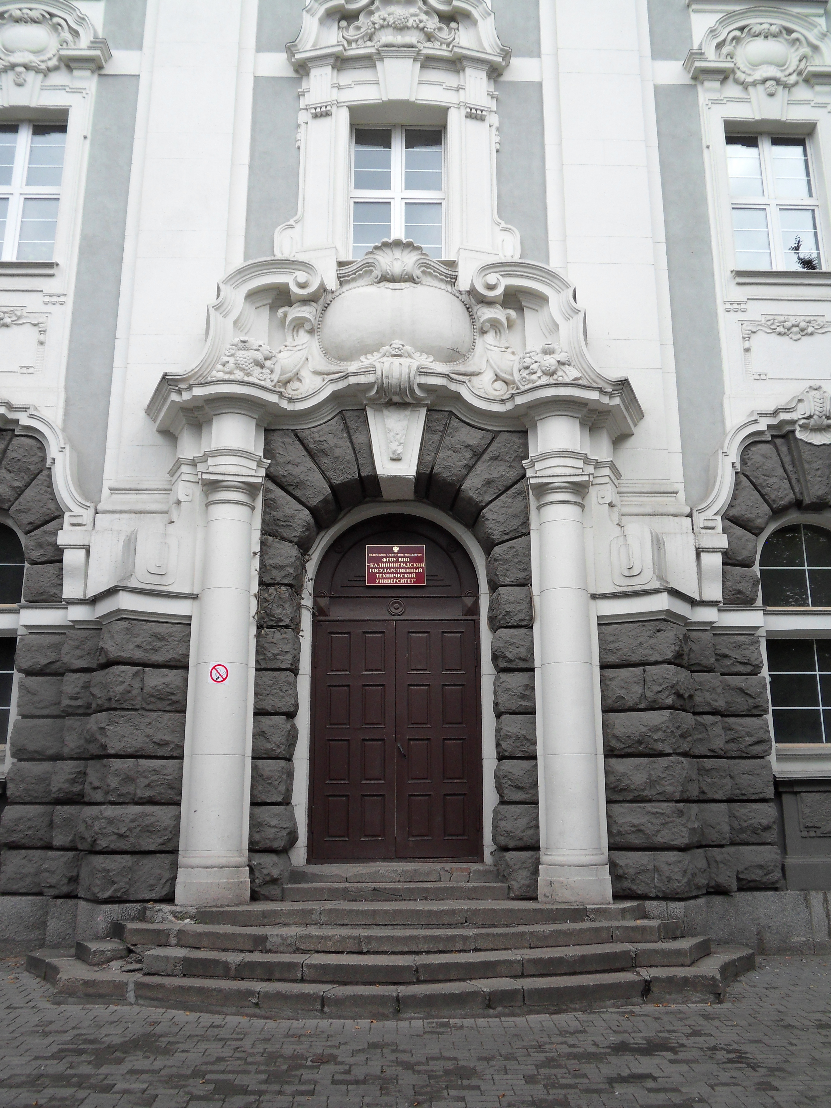 Здание с украшением центрального портала (Калиниградская область, Калининград, мира пр., 2)